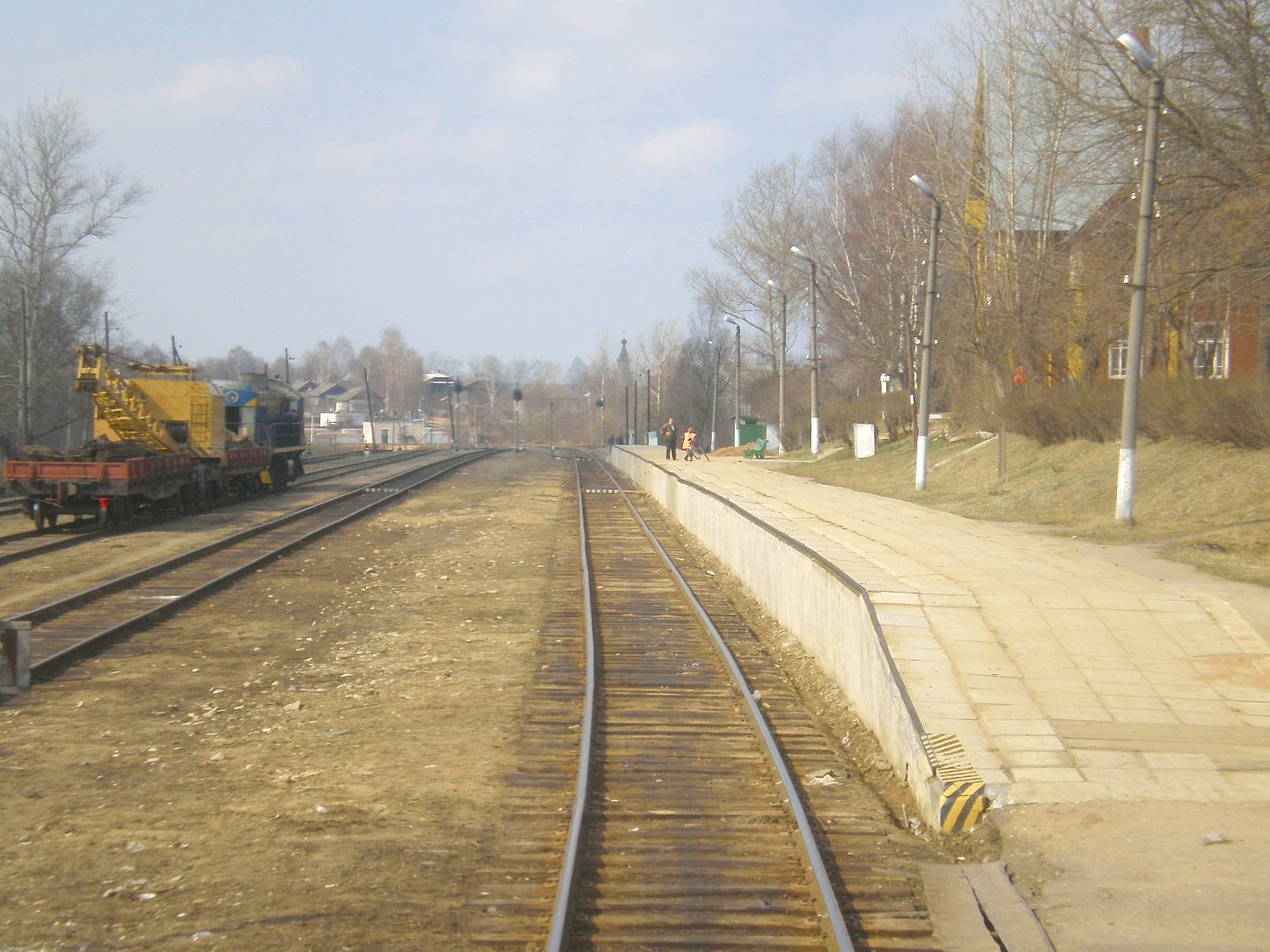 Железнодорожная станция Кувшиново (Октябрьская ЖД)